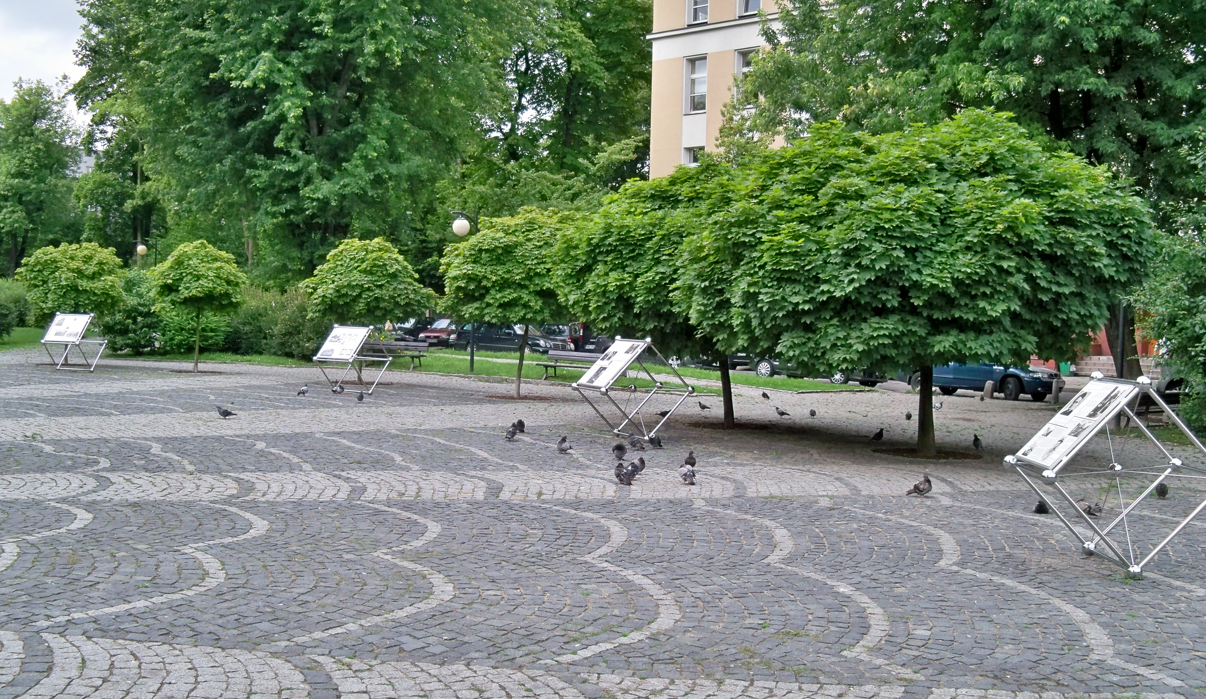 Ścieżka edukacyjna Marii Skłodowskiej-Curie w parku jej imienia w Warszawie. Cztery z pięciu "atomów" (punkt 2 ścieżki).